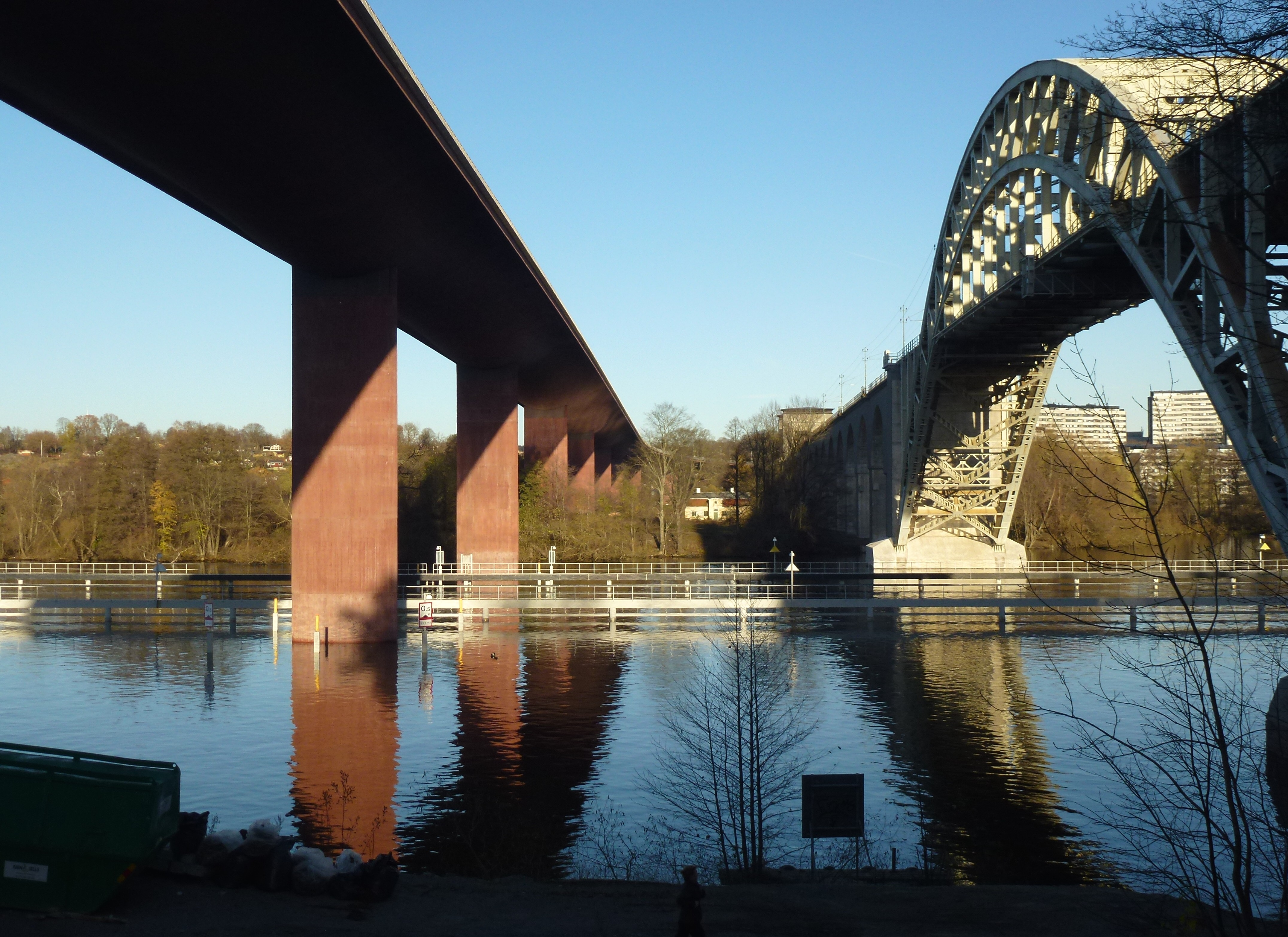 Årstabron i Stockholm, vänster den nya, höger den gamla